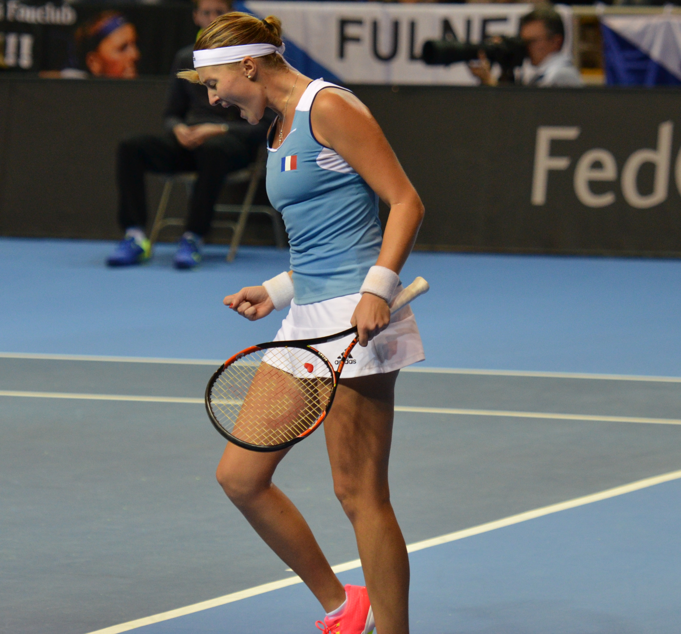 PPP_3057